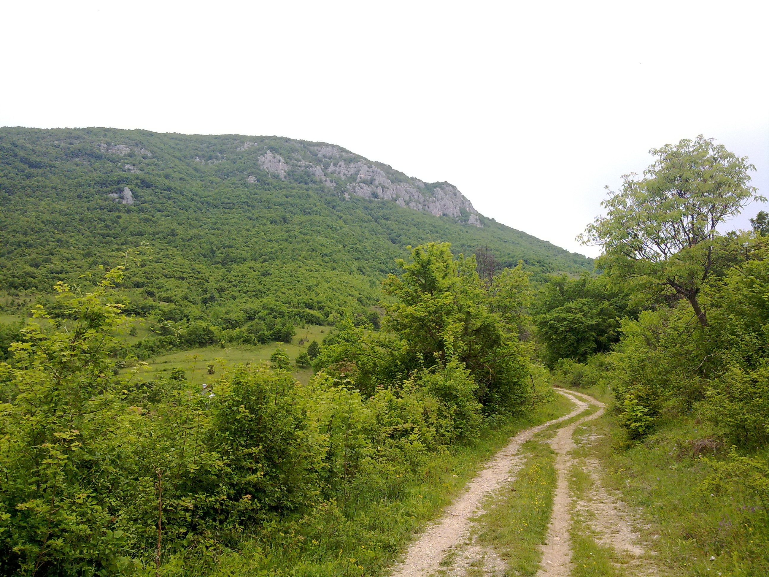 Put prema vrelu Sokosnice